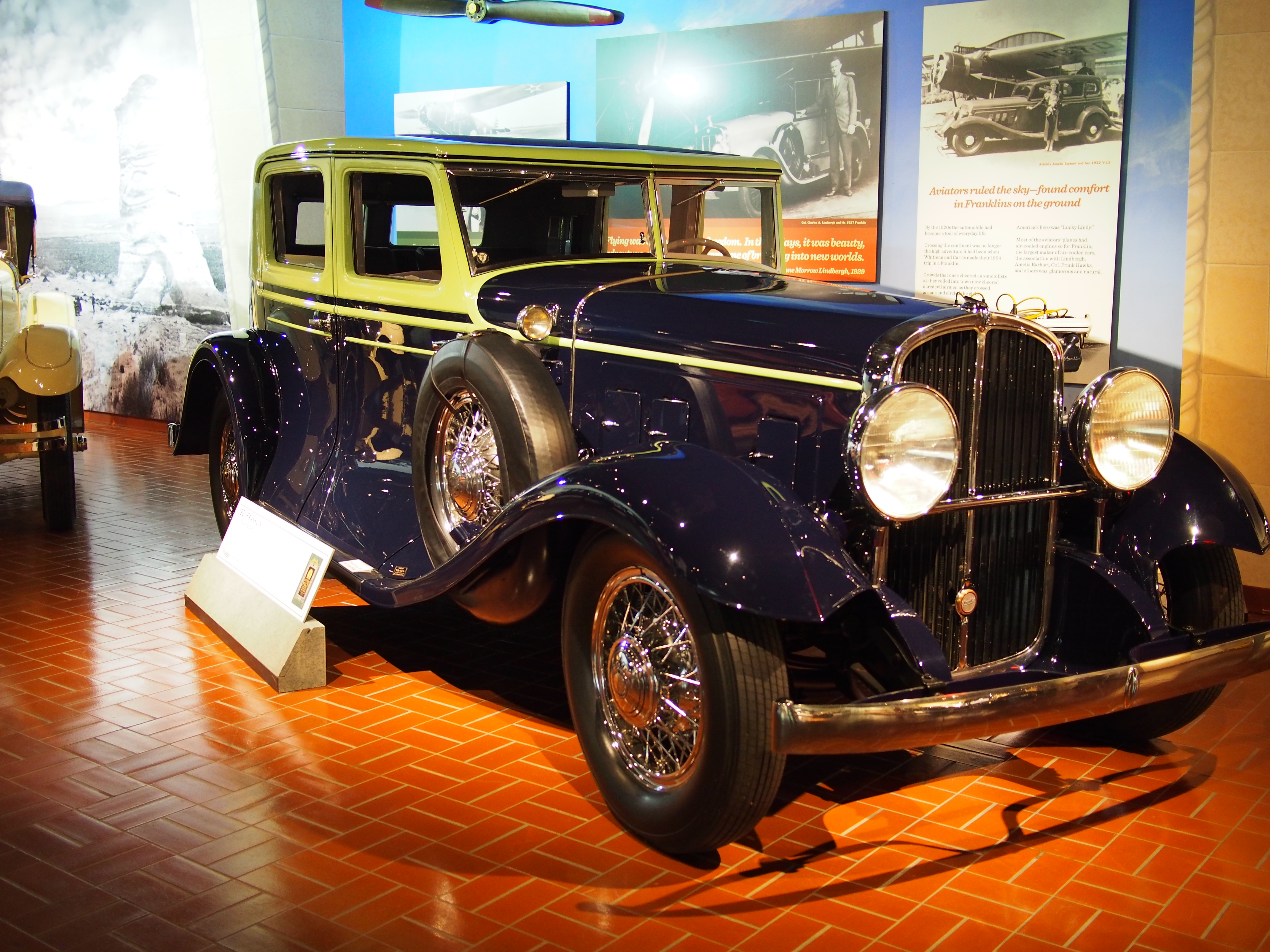 1931 Franklin Pirate Sedan